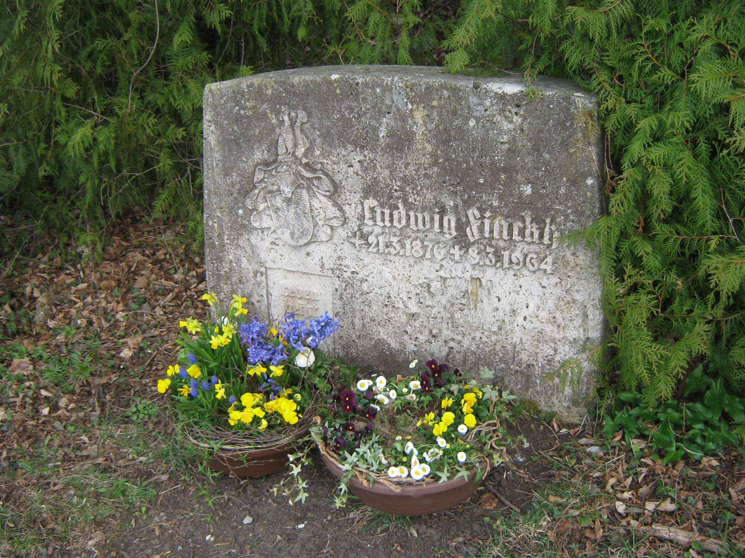 Grabmal und Gedenkstein von Ludwig Finckh an der Achalm bei Reutlingen